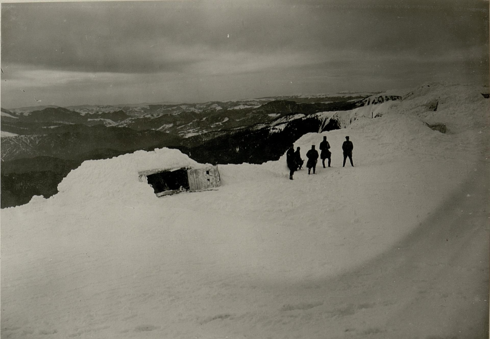 6.Würtemberg.Batterie auf Czornahora